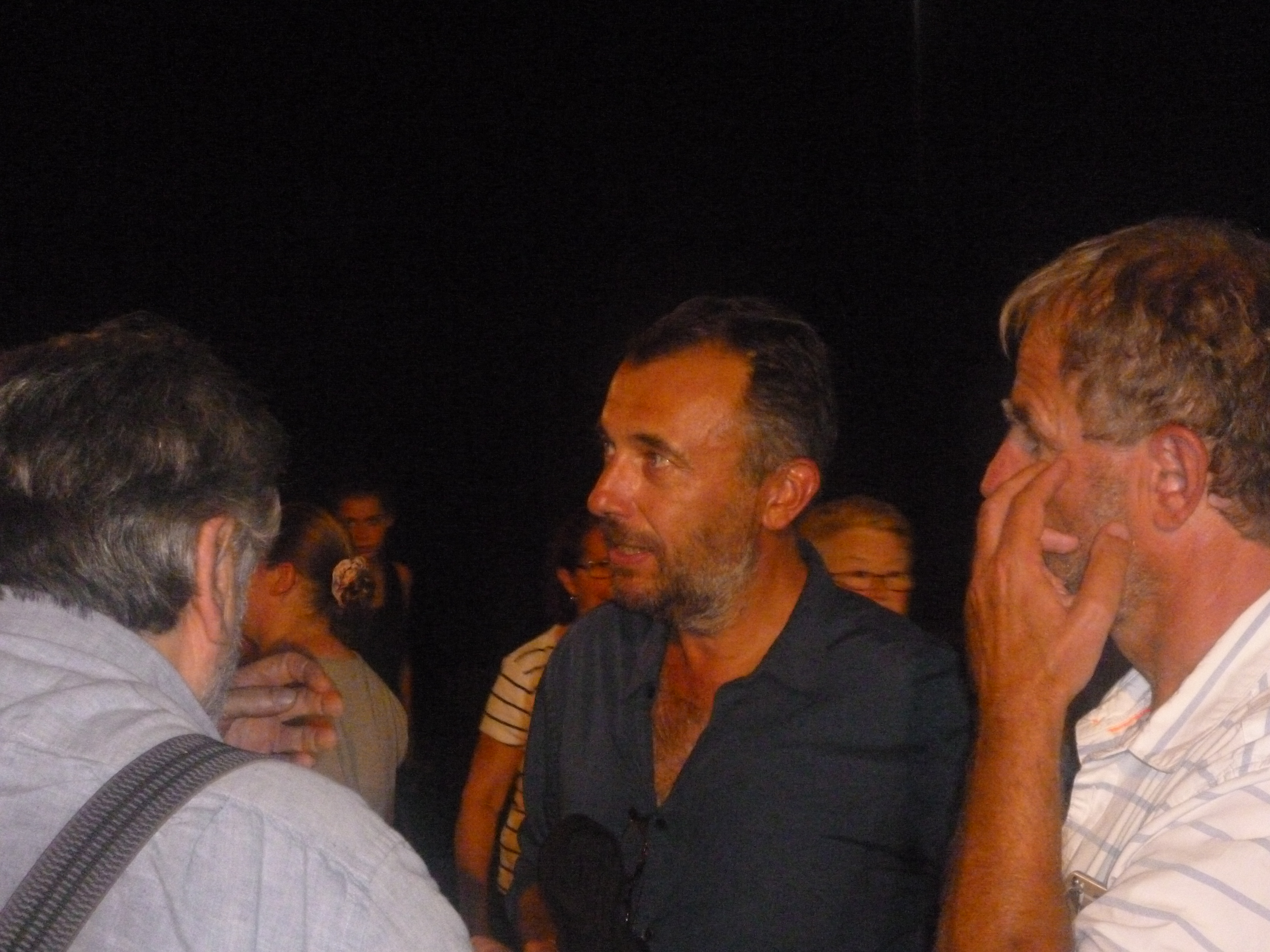 Fred Cavayé présentant le film "Radin !" en avant-première à Beauvais (Oise), le jeudi 25 août 2016.